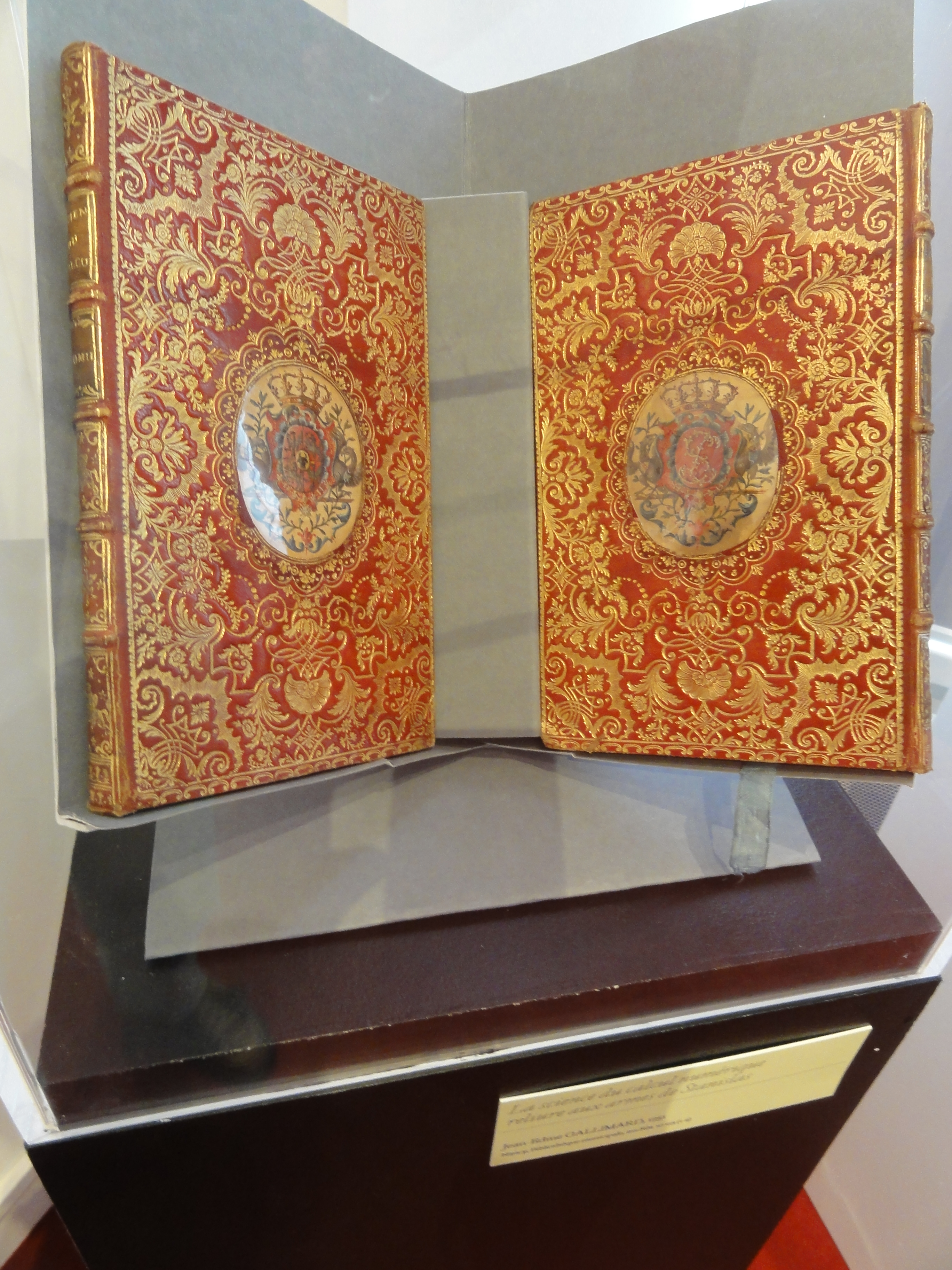 Château de Lunéville, Musée du château, reliure livres .